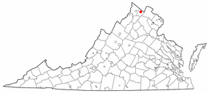 va maps